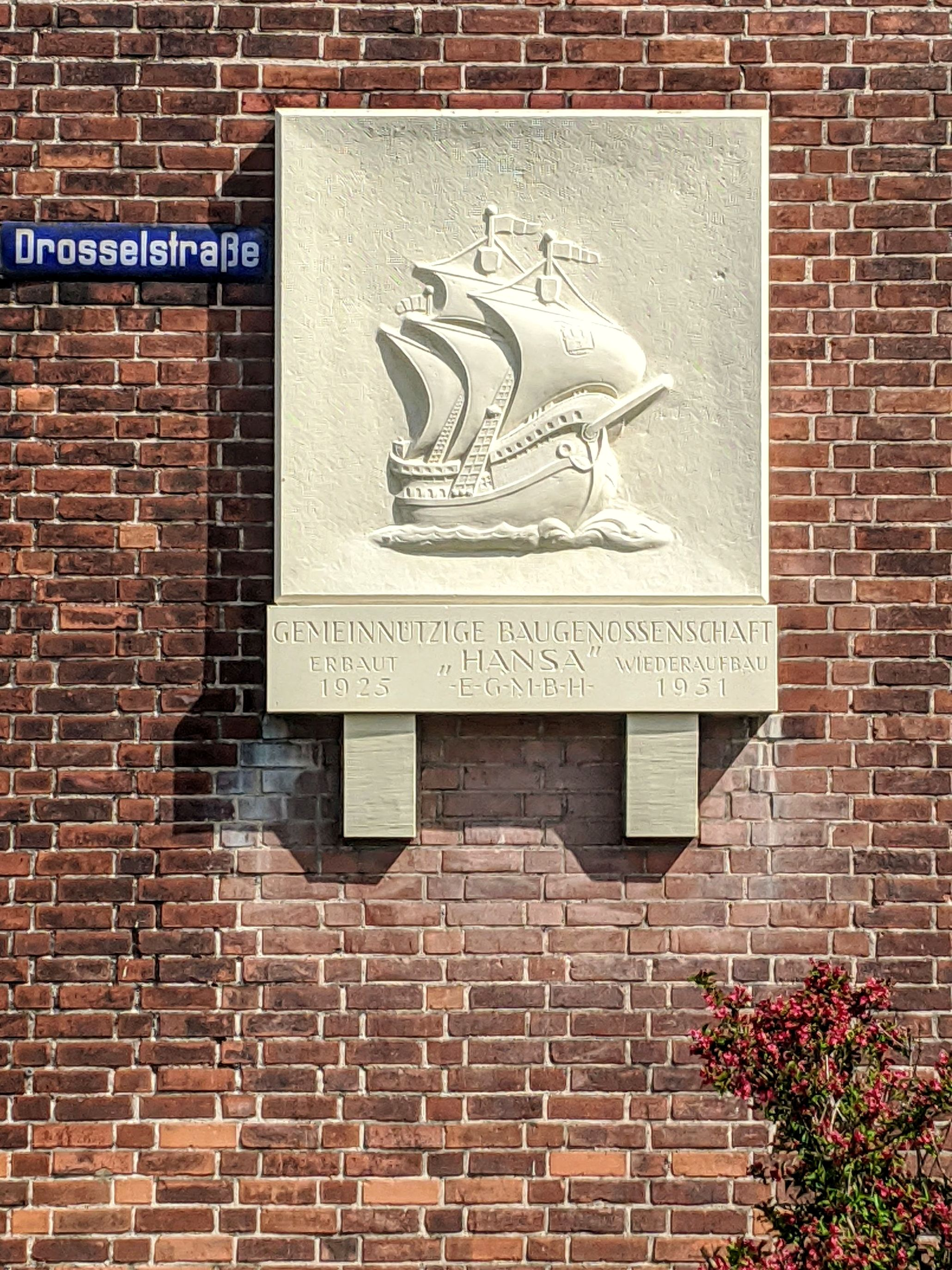 Logo der Hansa-Baugenossenschaft am Haus Drosselstraße 6a in Hamburg-Barmbek